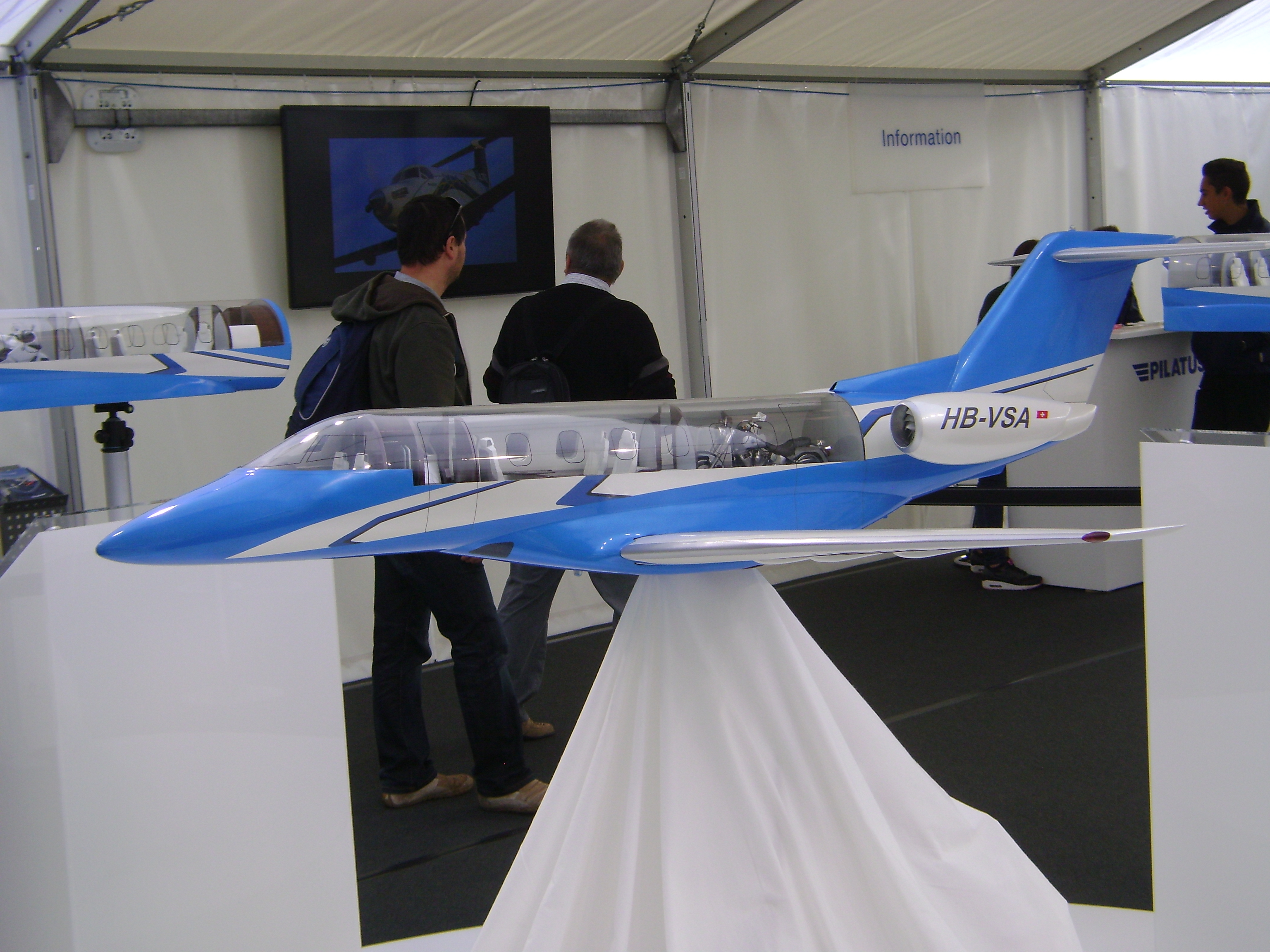 PC-24 Rumpfeinteilung